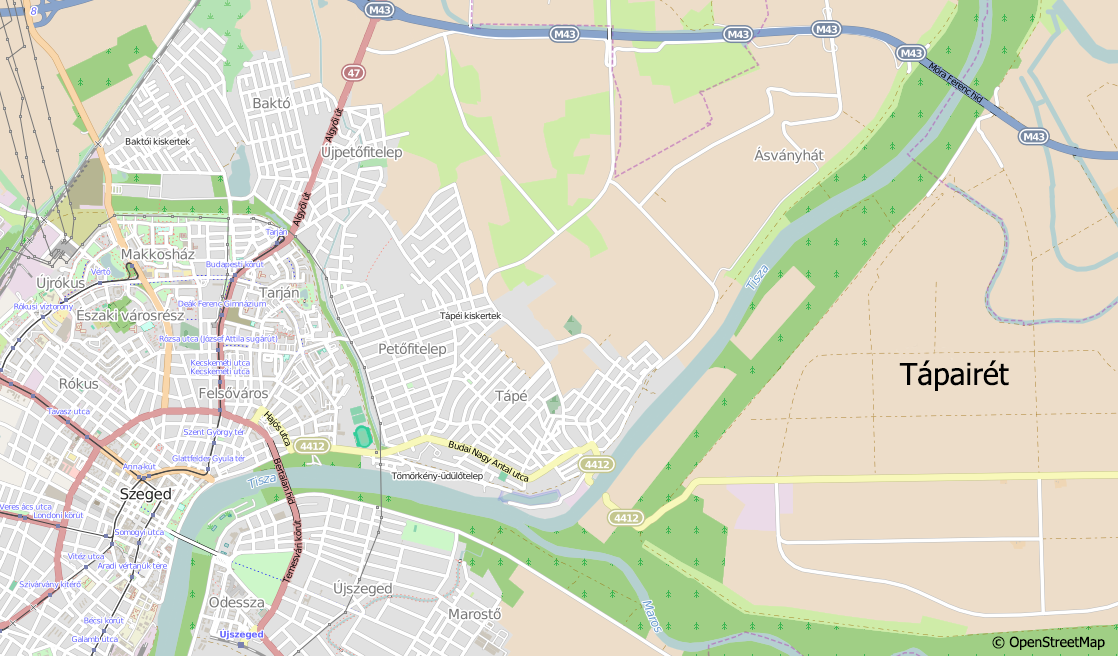 Térkép Tápairét helyzetéről This map may be incomplete, and may contain errors. Don't rely solely on it for navigation.